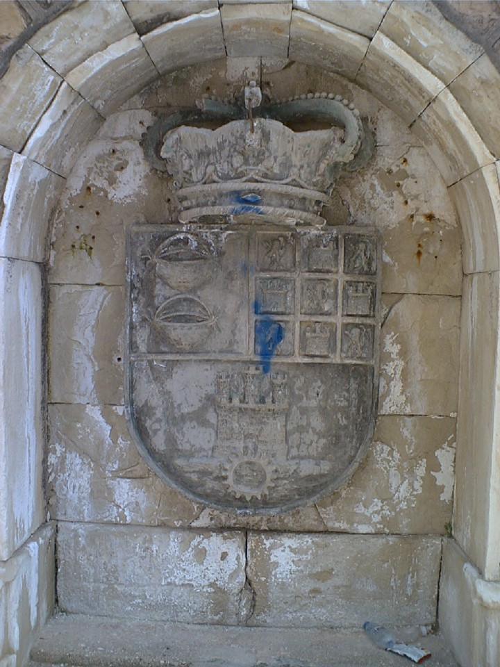 Blasón de piedra de la villa de Riópar (plaza del ayuntamiento), en la provincia de Albacete (España)